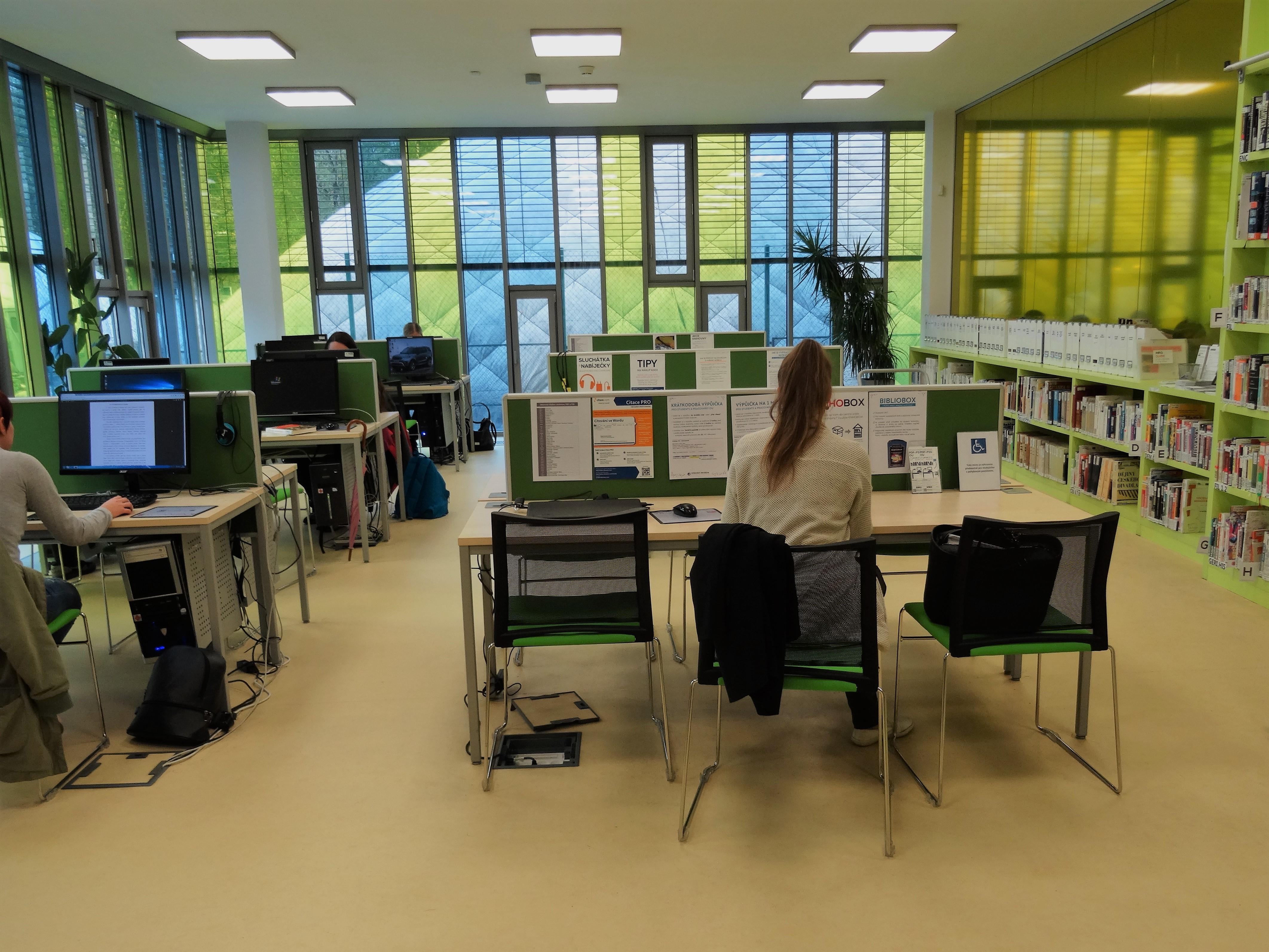 Studovna Pedagogické fakulty a Fakulty sociálních studií